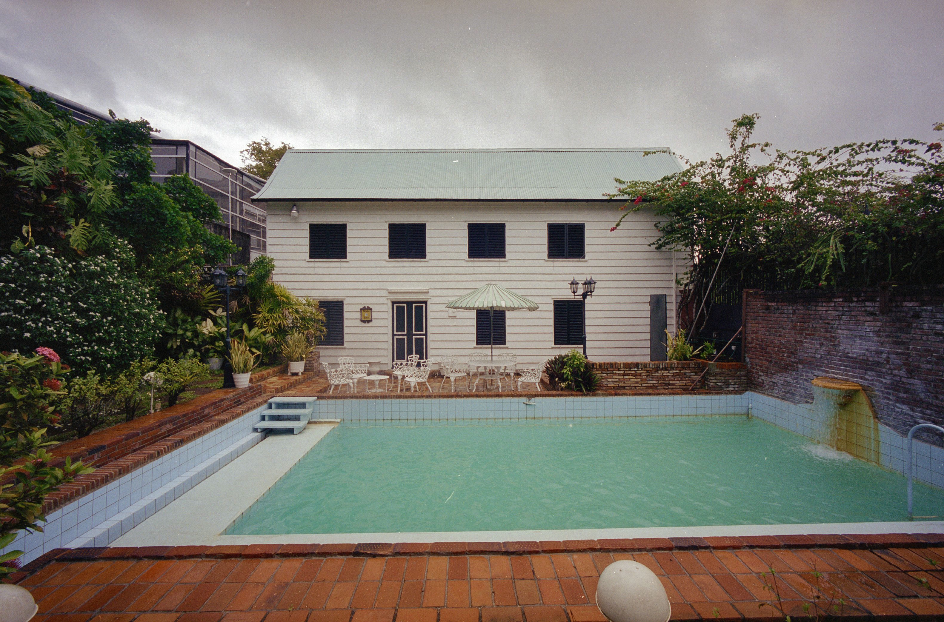 Koloniale geschiedenis: Overzicht achterzijde Onafhankelijkheidsplein 9 met omgeving (opmerking: Suriname reis Loek Tangel)